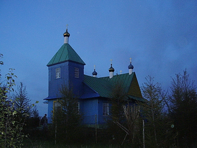 Мікасецк. Свята-Троіцкая царква